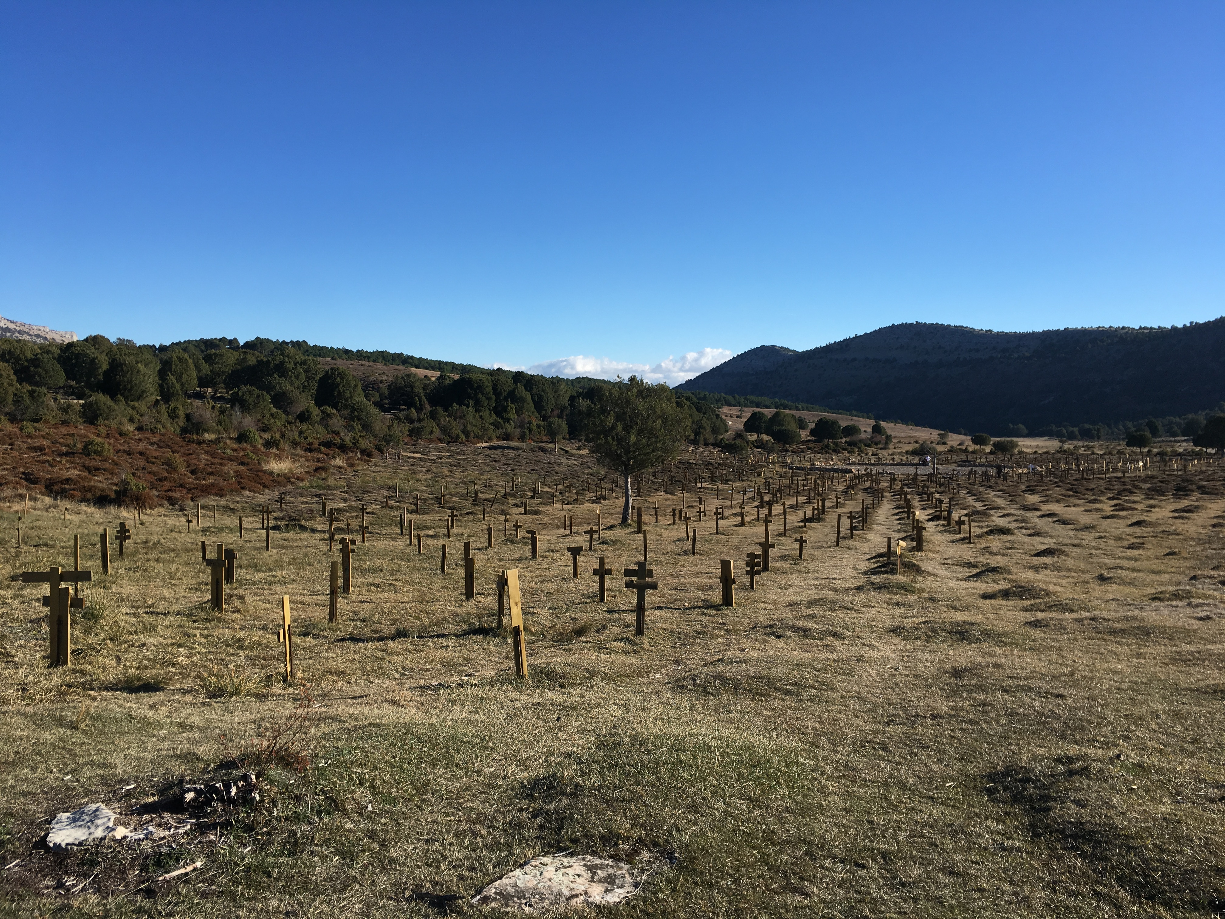 Contreras This is a photography of a Special Area of Conservation in Spain with the ID: ES4120091. Natura2000 entry, EEA entry